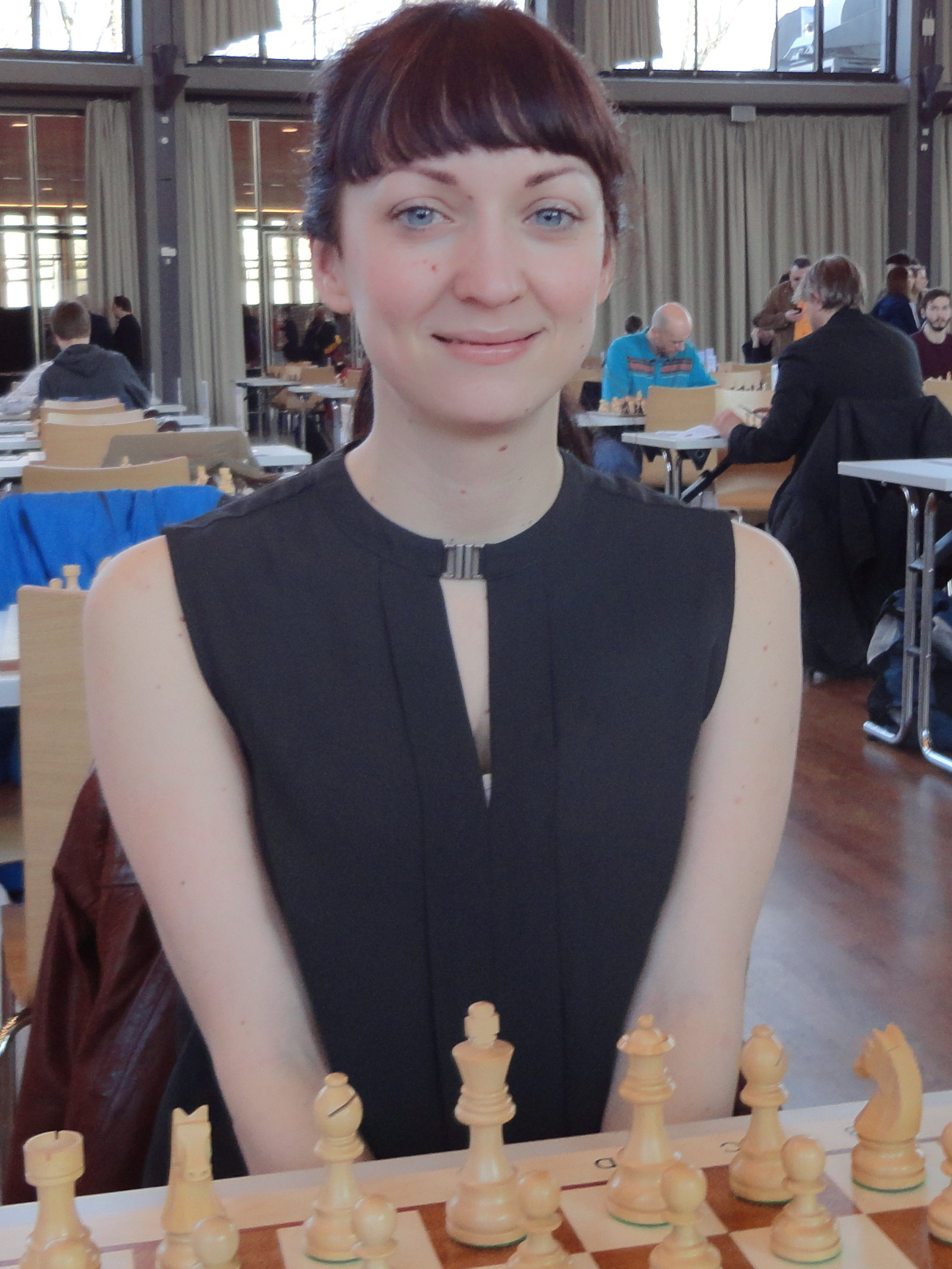 Elisabeth Pähtz, Grenke Chess Open 2016 in Karlsruhe.